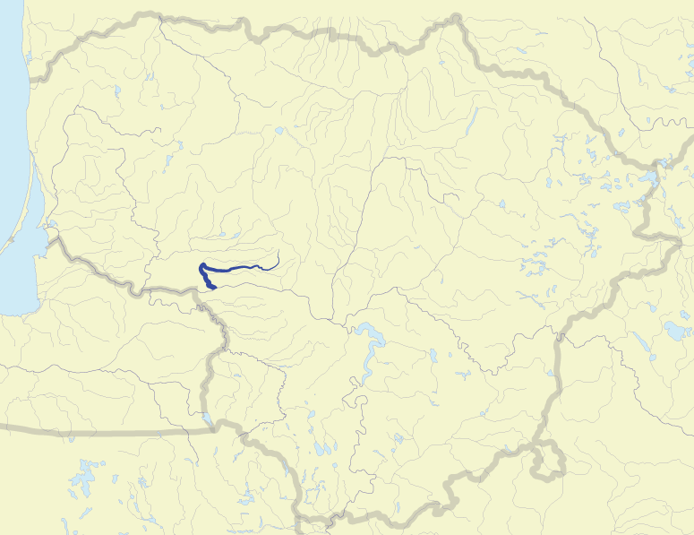 River Mituva